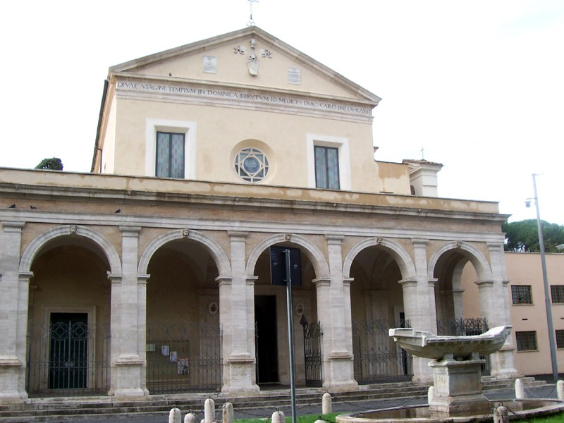 Roma - Chiesa di S. Maria in Domnica